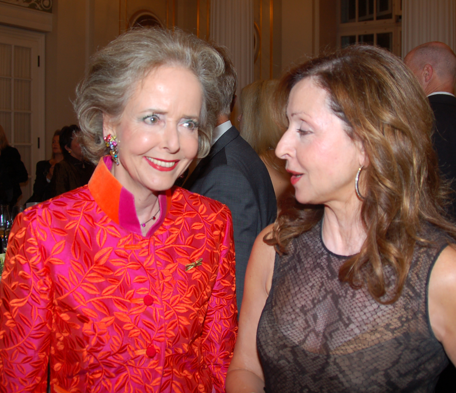 Preisverleihung Quadriga 2010